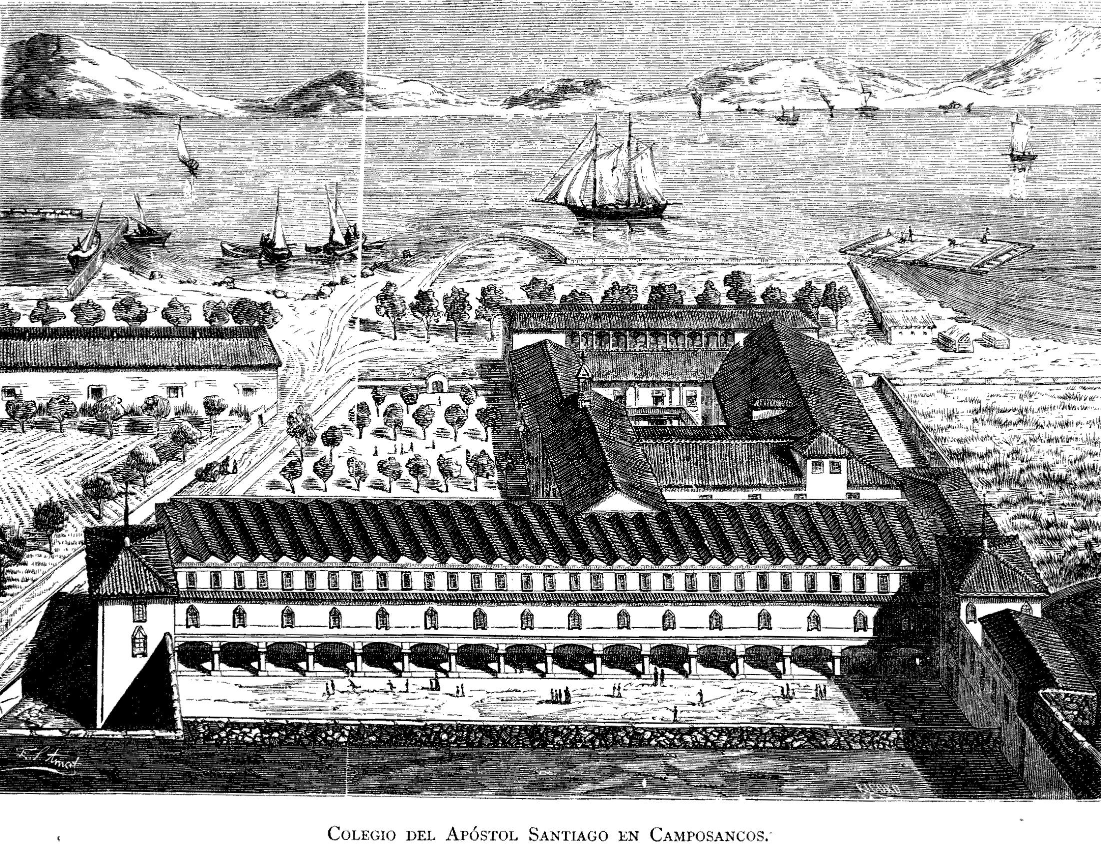 Colegio del Apóstol Santiago en Camposancos